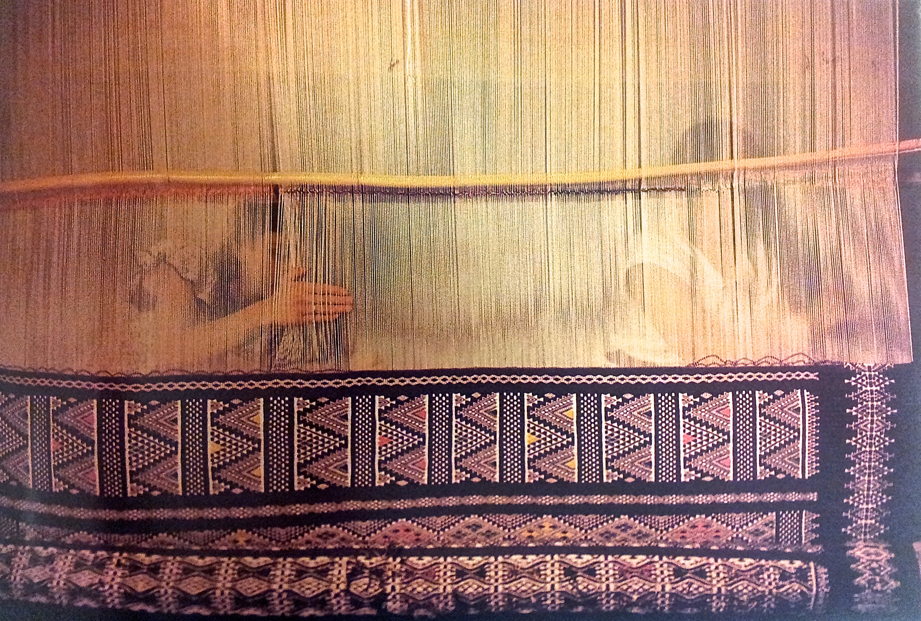 Tapisserie kabyle (Algérie)